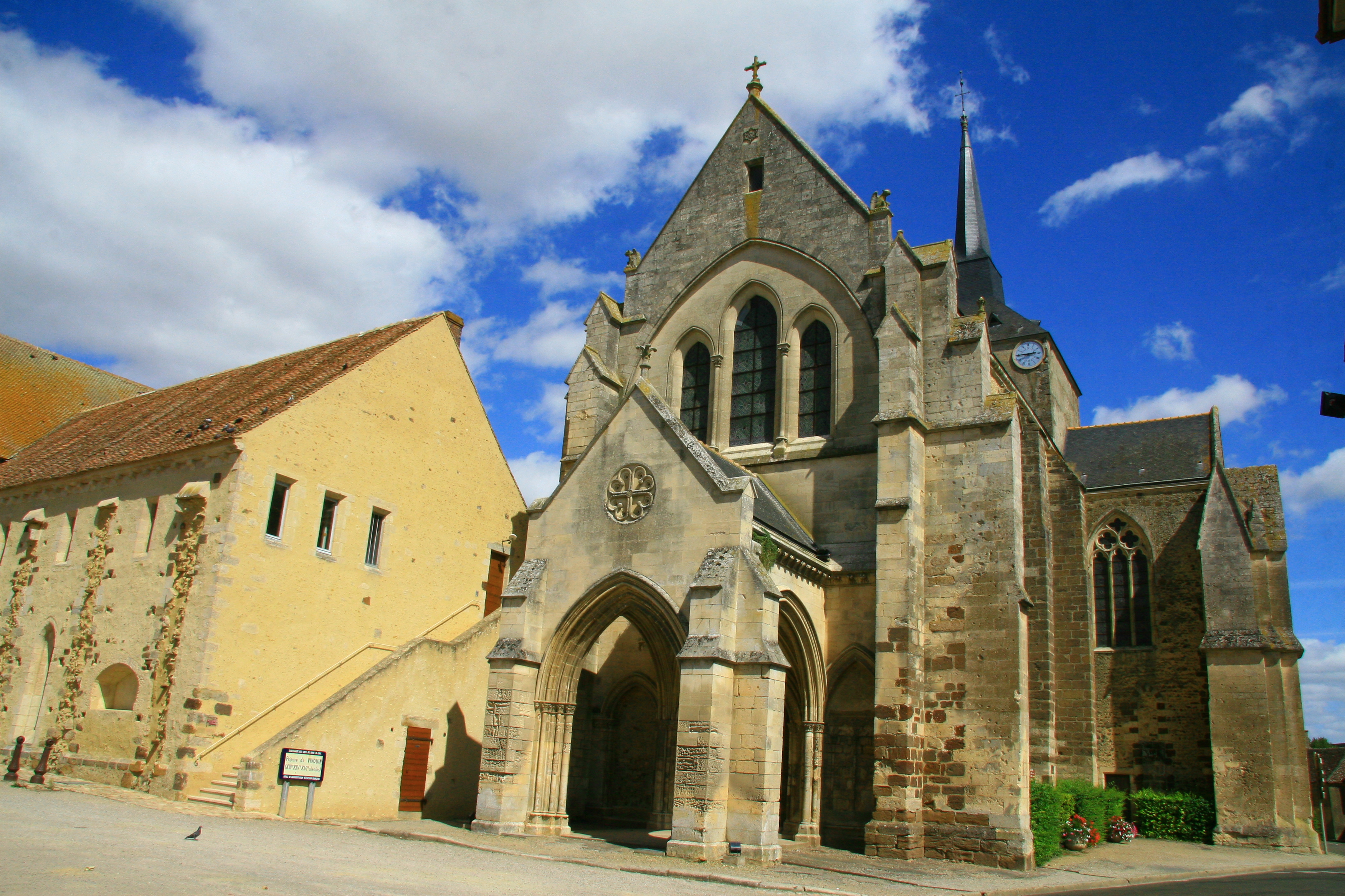 Église Saint-Hippolyte de Vivoin, Sarthe, Pays de la Loire, France